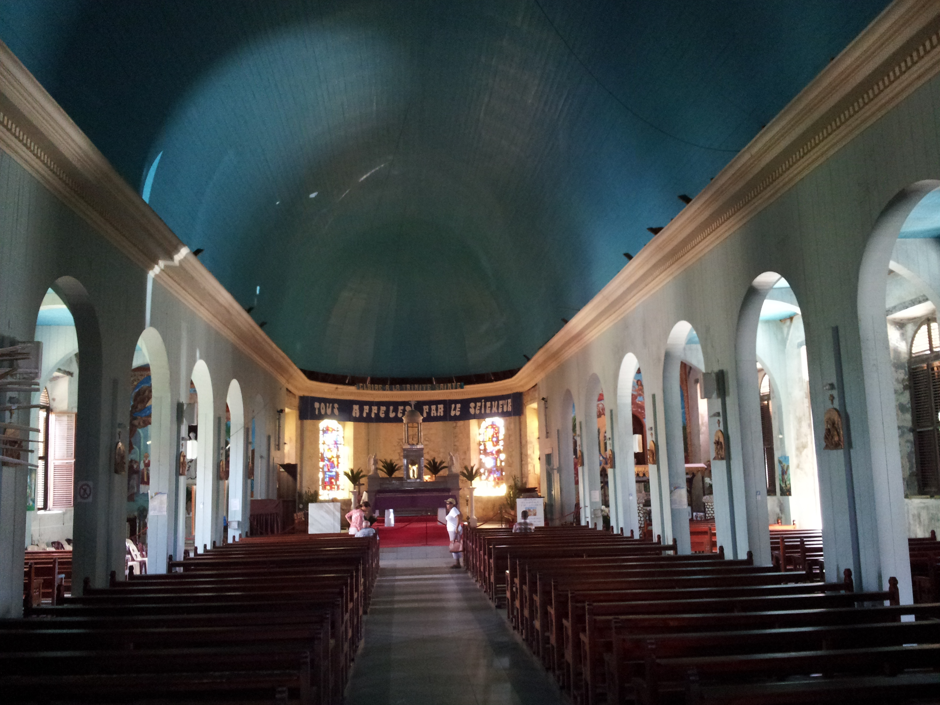 Intérieur de l'église de l'Immaculée-Conception de Grand-Bourg